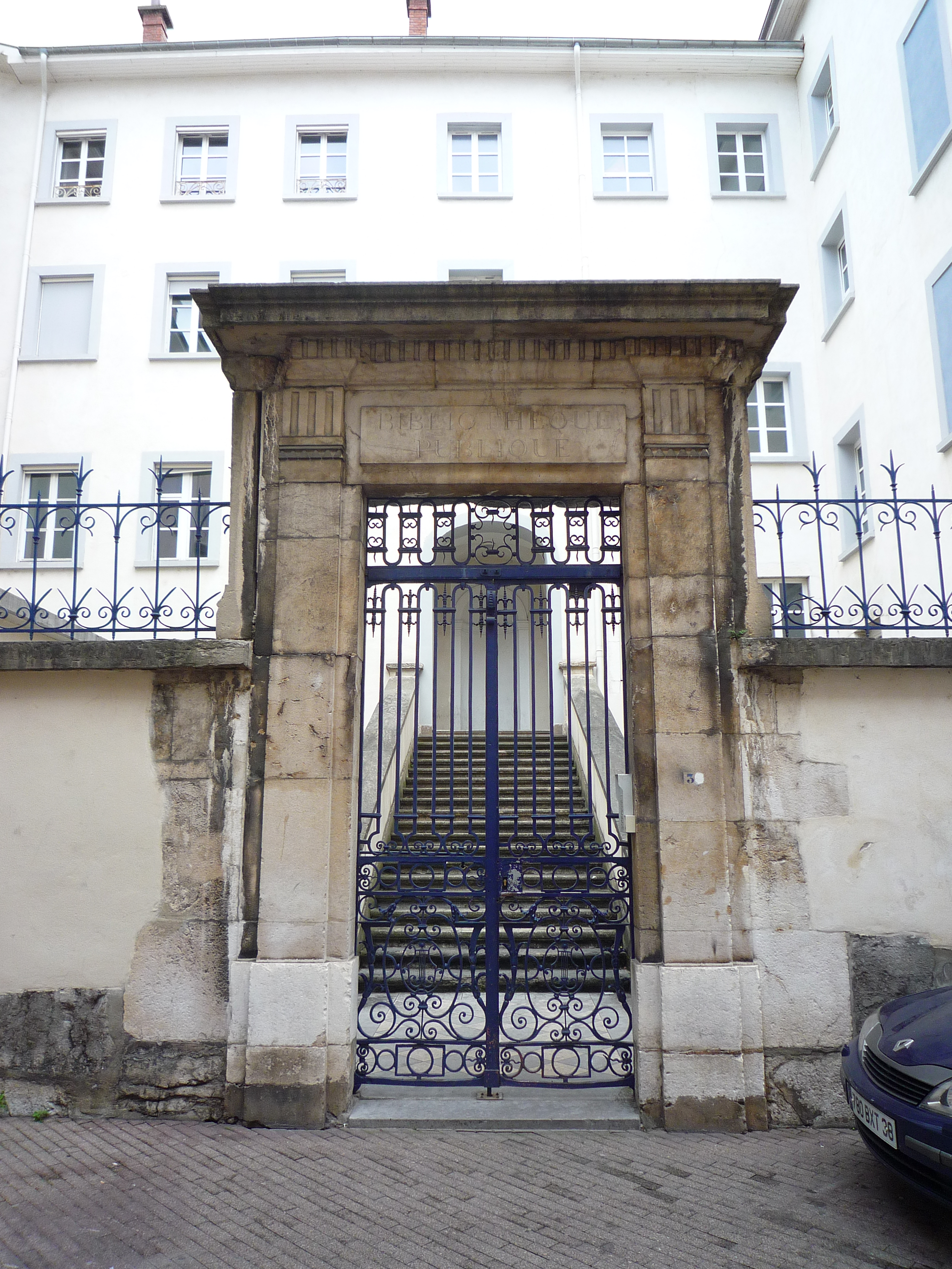 Entrée de l'ancienne bibliothèque publique de Grenoble avant 1872 (passage du lycée) et son transfert sur l'actuelle place de Verdun.